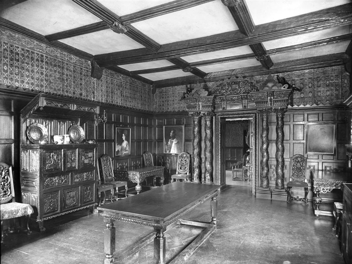 Gwydir Castle - Dining Room